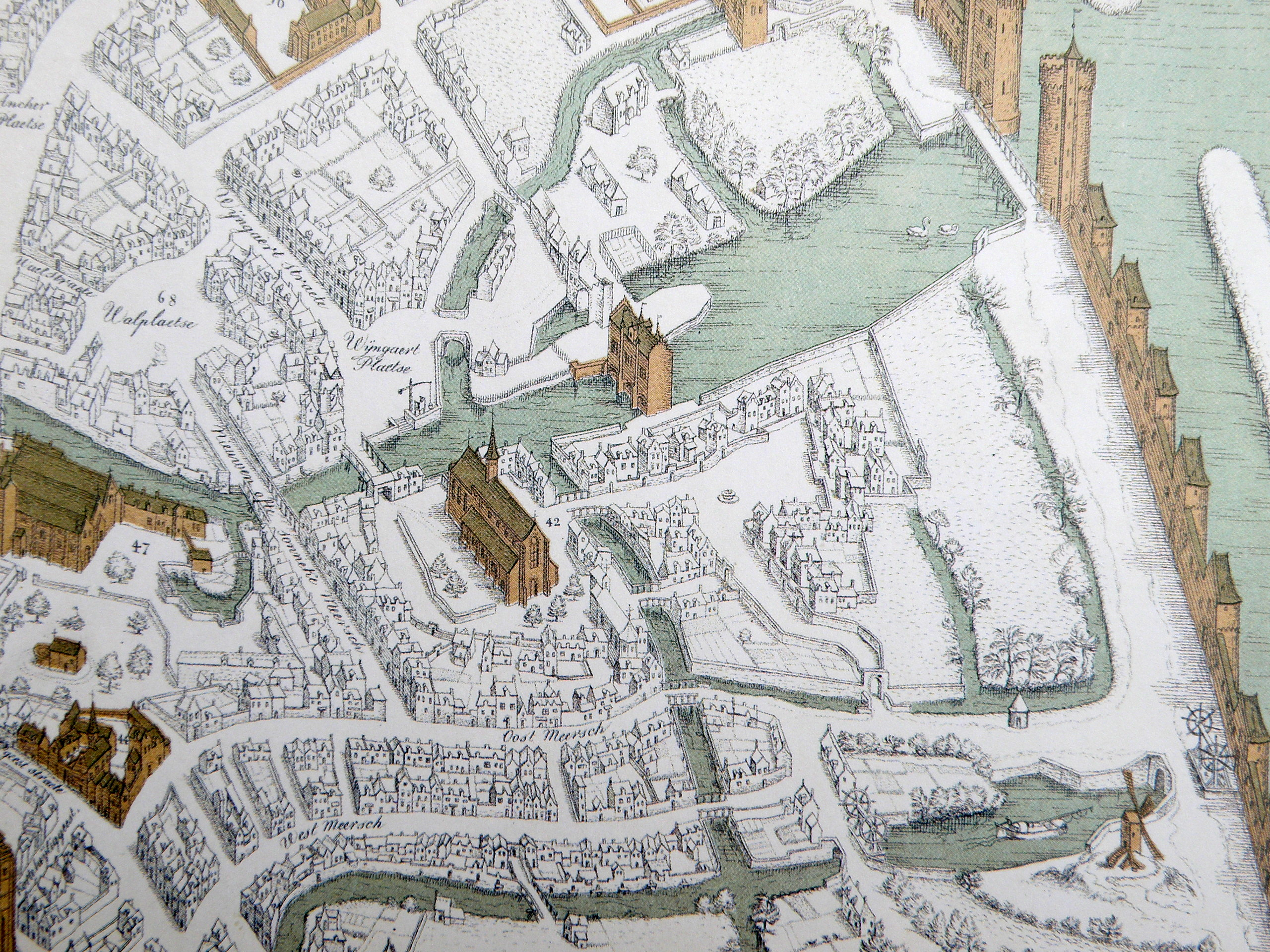 Plan van Brugge (1562) door Marcus Gerardus (of Marcus Gerards, Marc Gheeraerts). Close-up van het zuidelijke deel van Brugge (rond begijnhof).